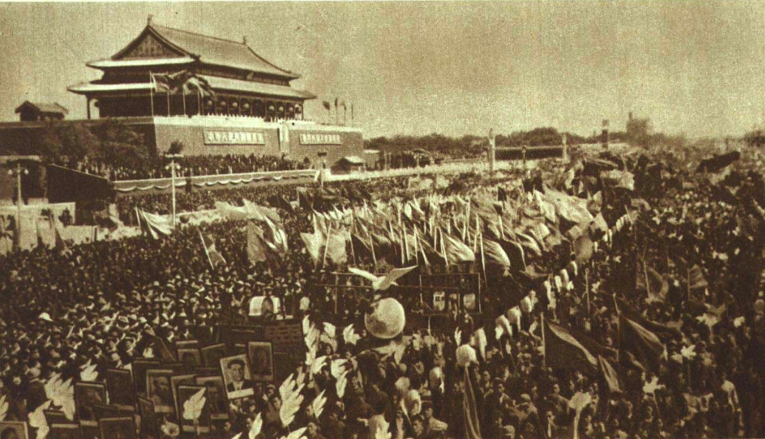 1952年中华人民共和国第三年国庆节庆祝典礼2